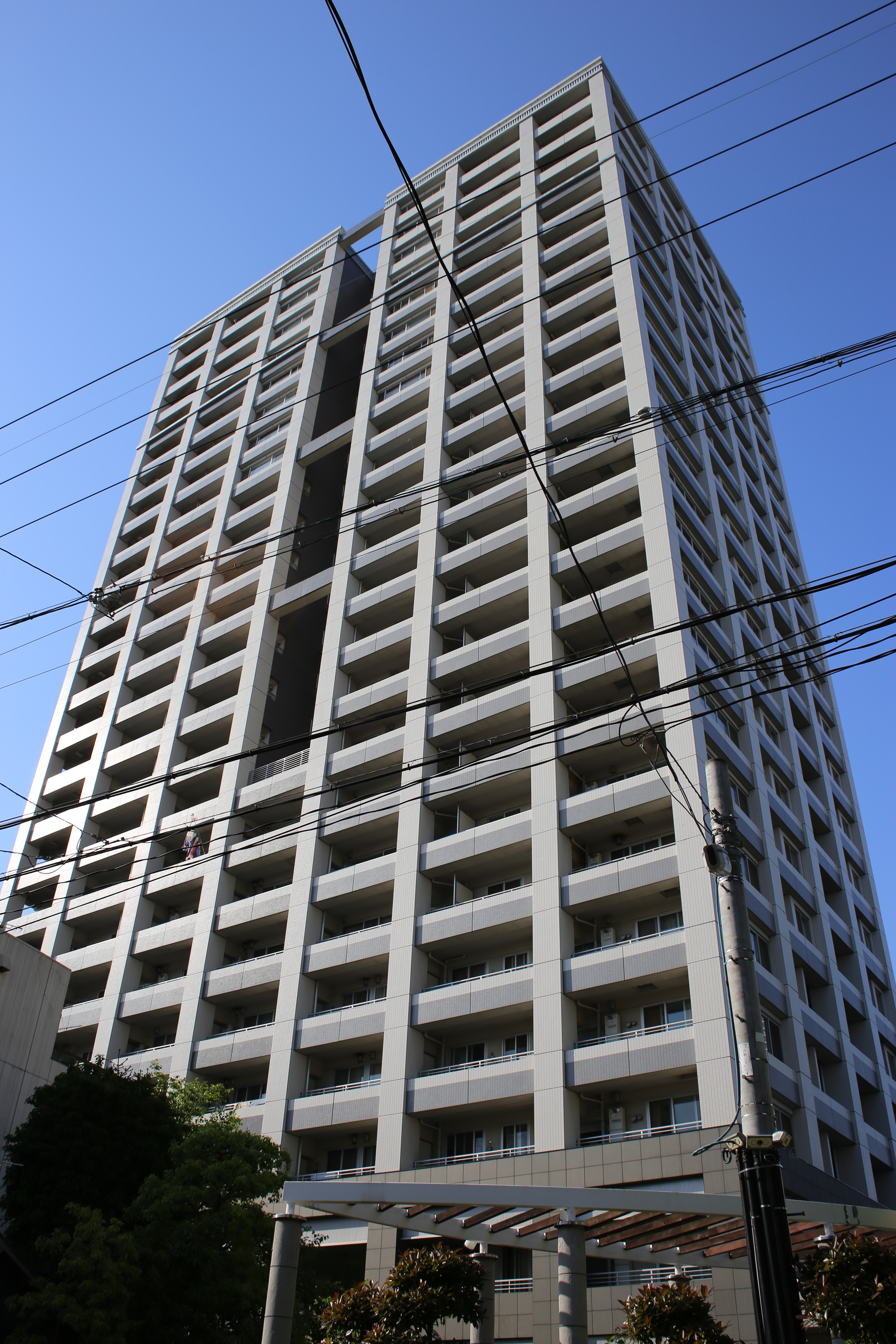 名古屋市中区伊勢山一丁目のGAタワーを南側公道東側より撮影。